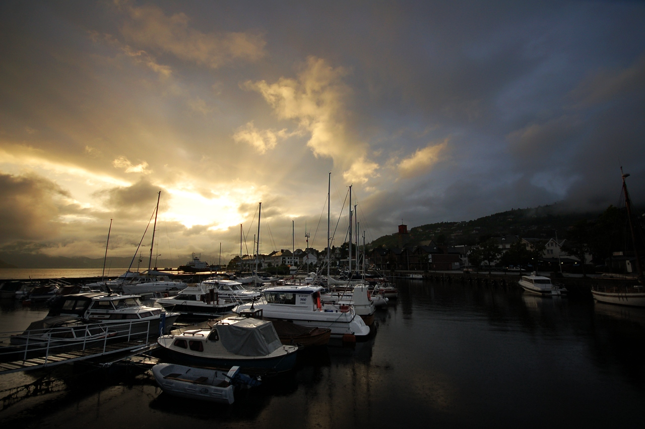 Småbåthamna i Volda